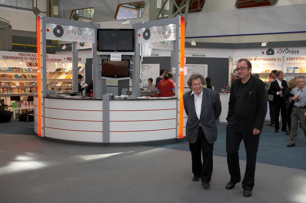 Konrád György (balra) és Robert Menasse a Budapesti Nemzetközi Könyvfesztiválon